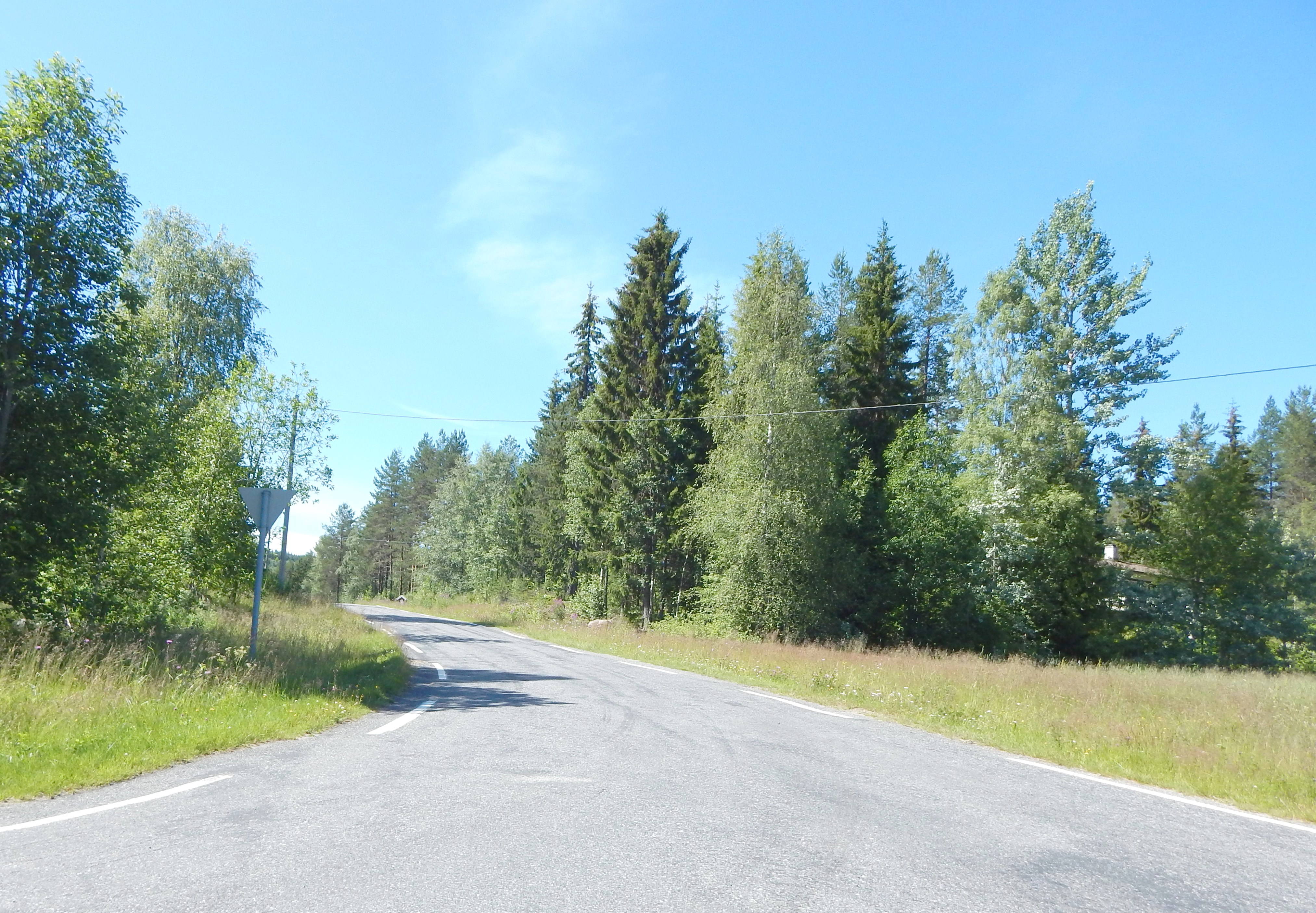 Hovinvegen (FV543)